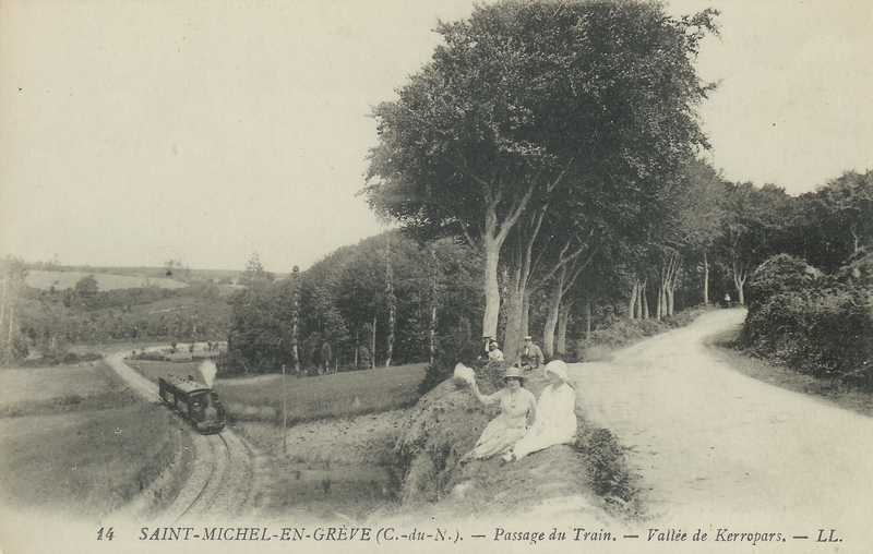 Le train des chemins de Fer des Côtes-du-Nord à Saint-Michel-en-Grèves.